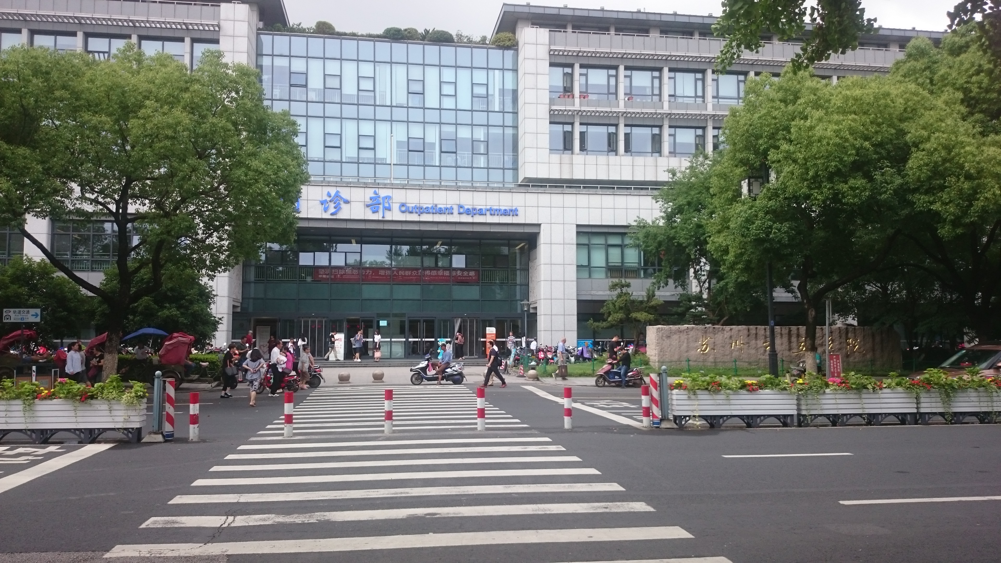 苏州市立医院（本部）